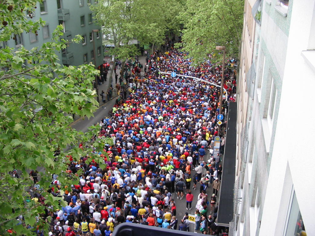 Mainz Marathon 2005 Startaufstellung von Rathaus bis Holzturm